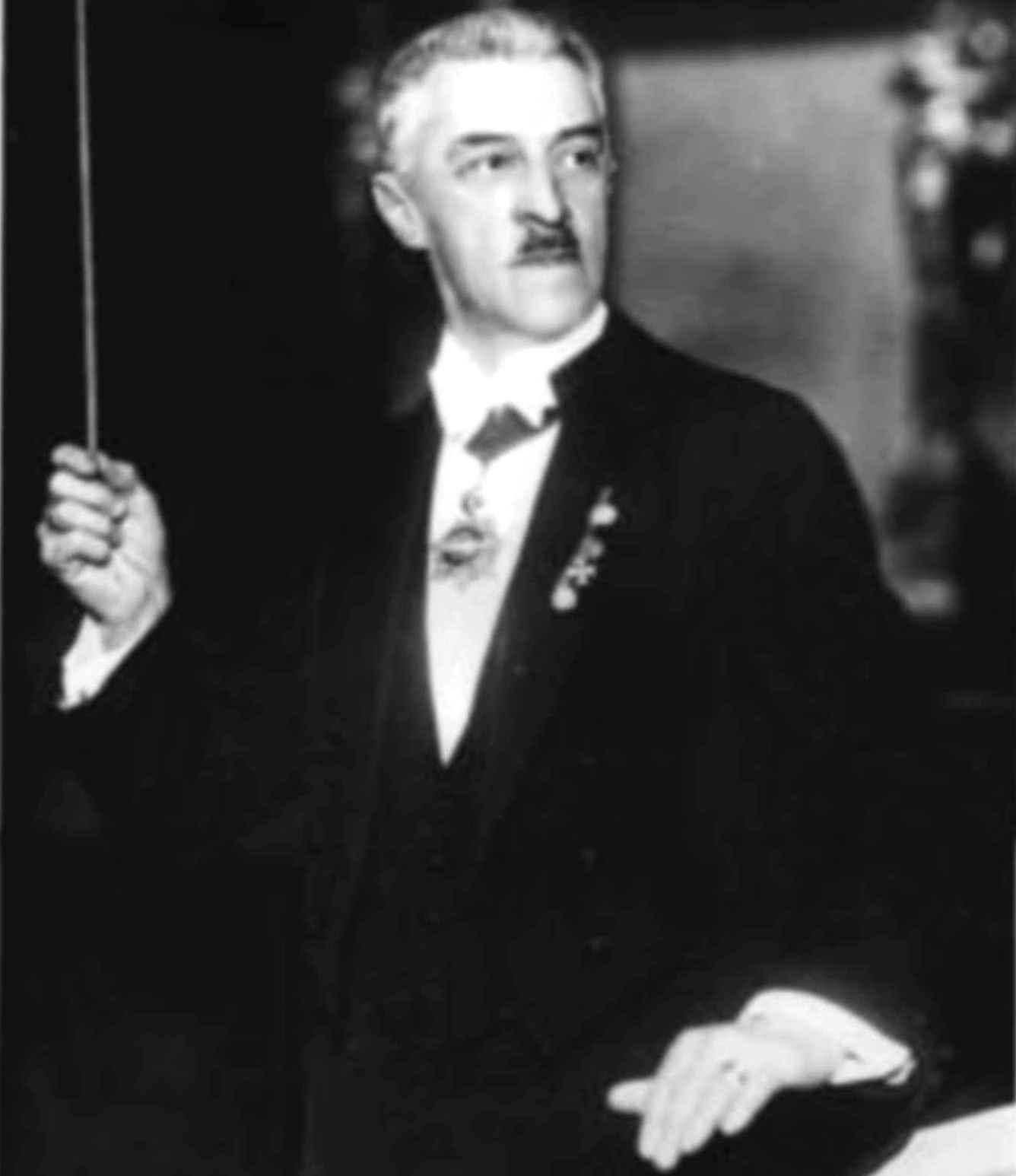 Johann Eduard Strauss Komponist (1866-1939)